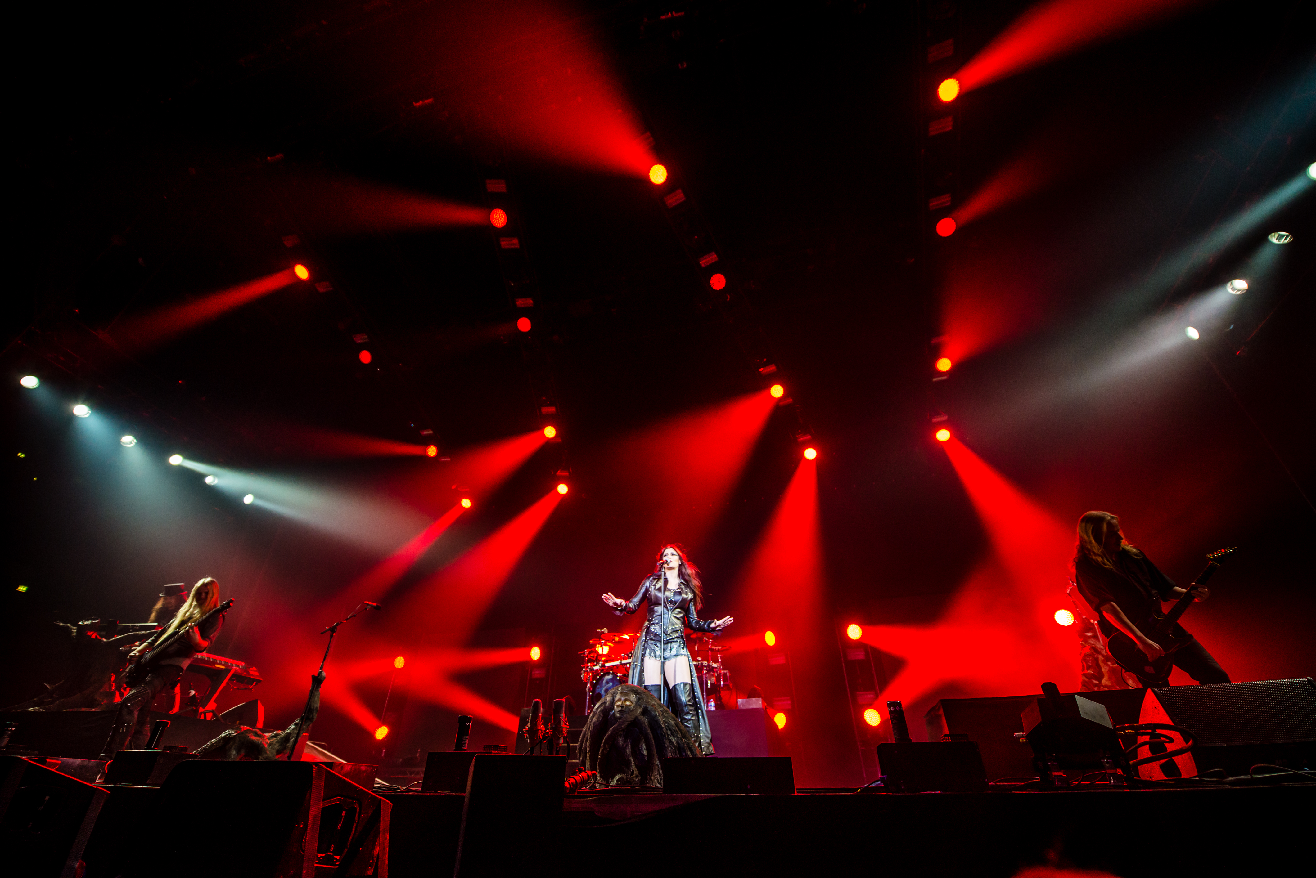 'Nightwish Endless forms most beautiful Tour 2015 Oberhausen'